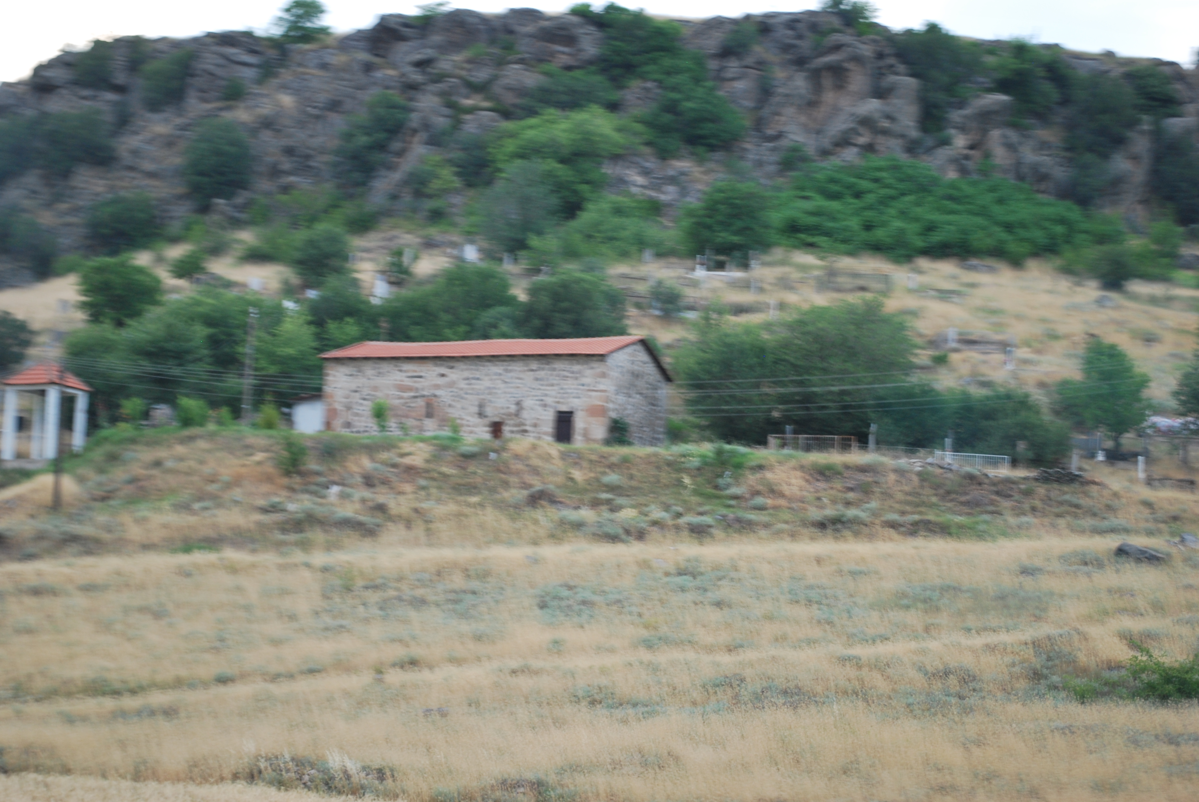 St. Petka Church in Mlado Nagoričane, Macedonia